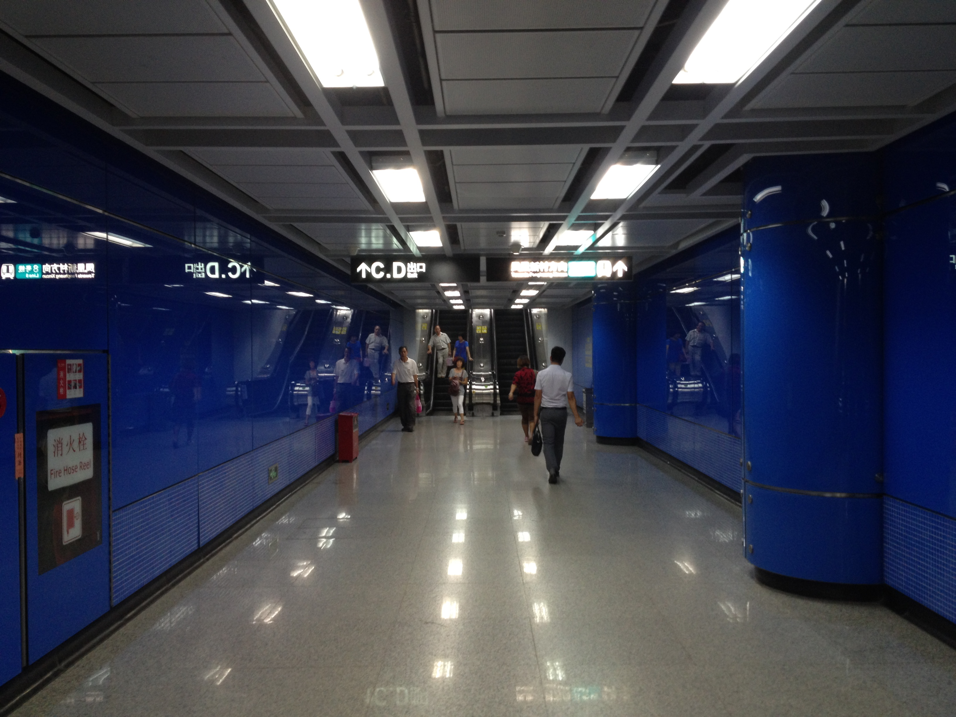 广州地铁万胜围站站厅联络通道